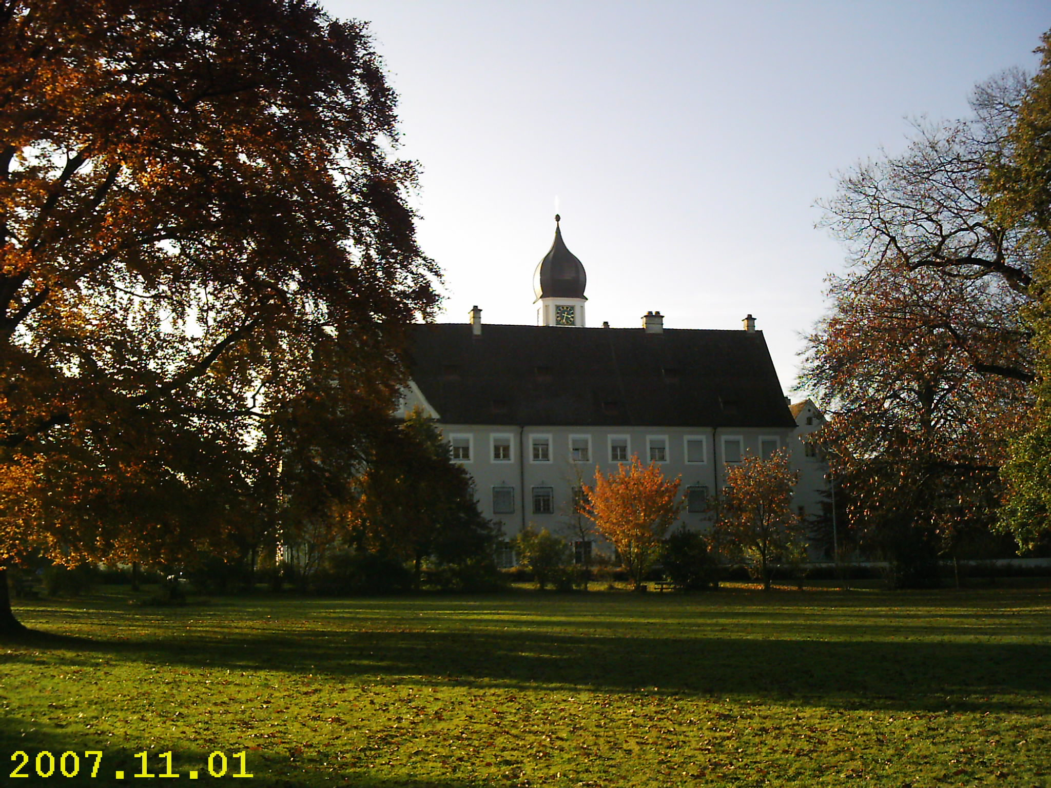 Alte Schloß, 88459 Tannheim, Deutschland